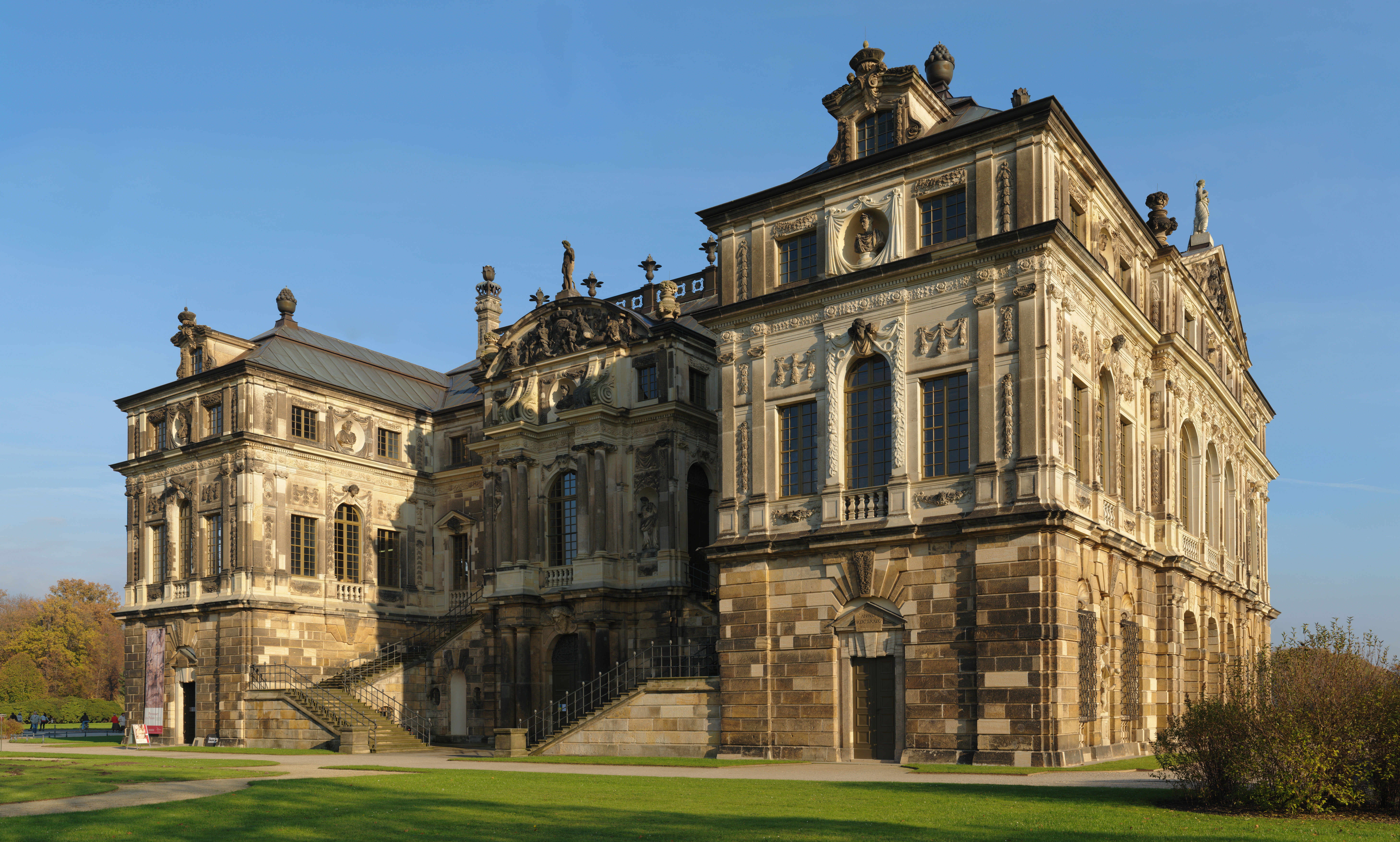 Palais im Großen Garten Dresden; Deutschland stitching of 32 images with hugin